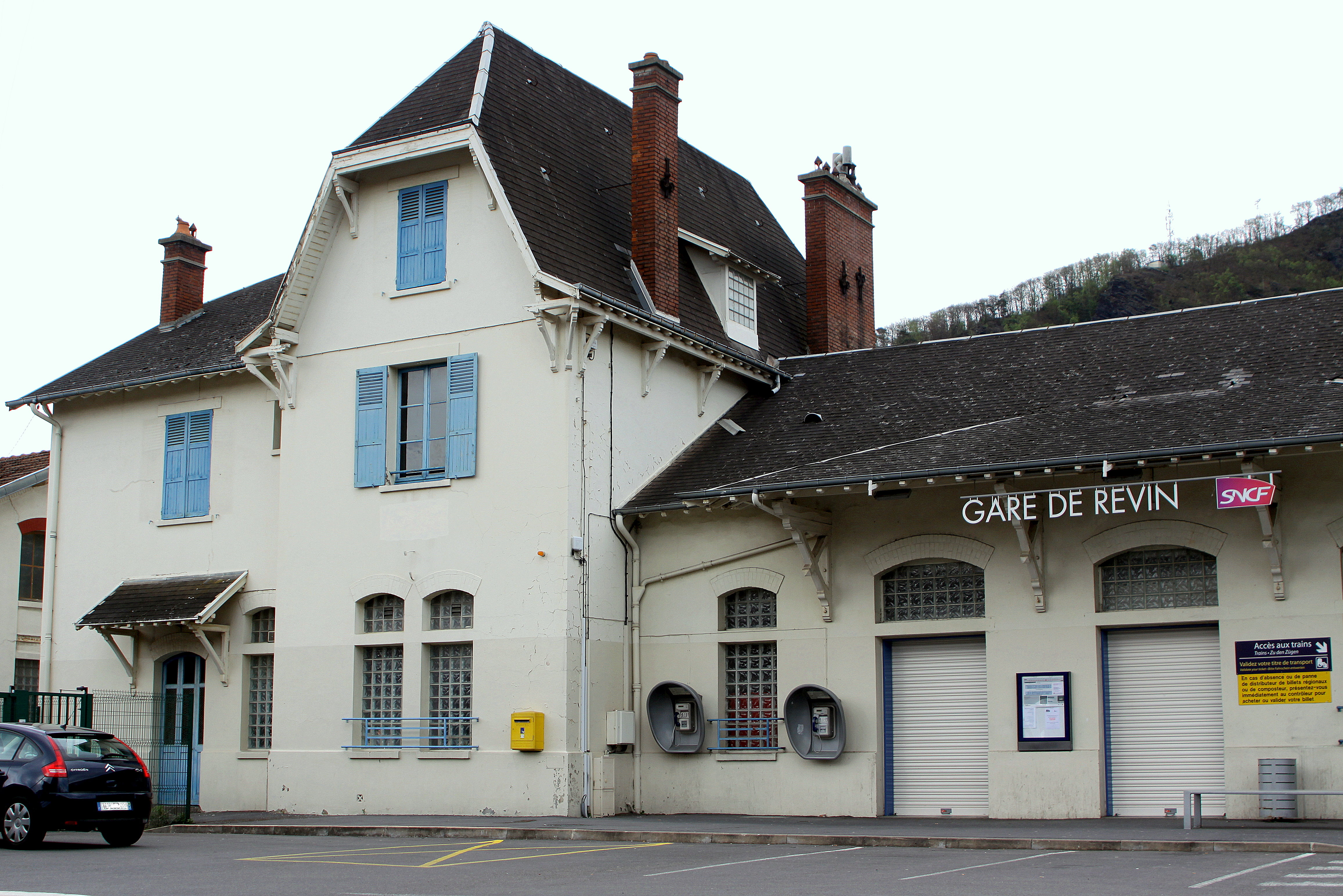 D'Gare vu Revin 2012